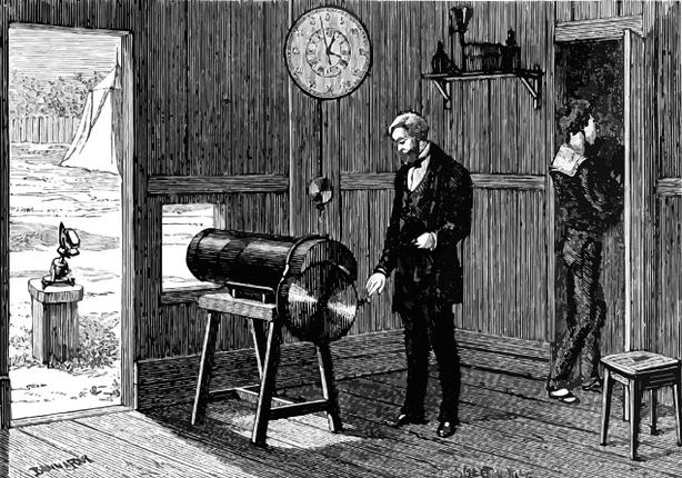 Съёмка транзита Венеры в 1874 году в Японии при помощи фотографического револьвера Жансена